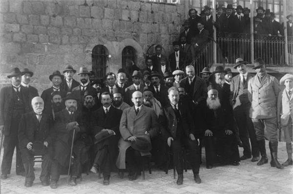 ירושלים - כנס רבנים